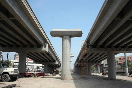 hace referencia a la inversión en proyectos que beneficien a la sociedad. tasa social de descuento